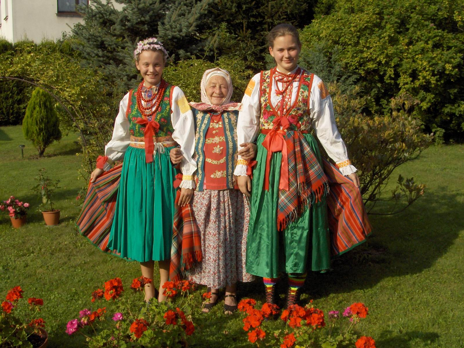 Ślůnski: Uobleczyńy do wjelgigo fajrowańo, we postrzodku - do chodzowańo po czornu.